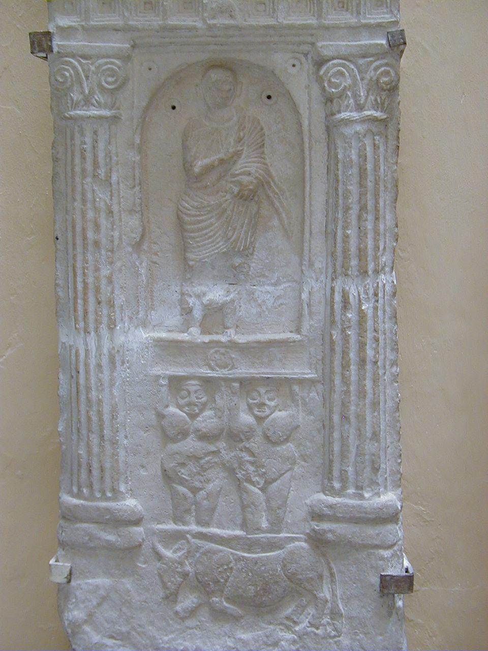 Stèle Ghorfa registre médian et inférieur Bardo